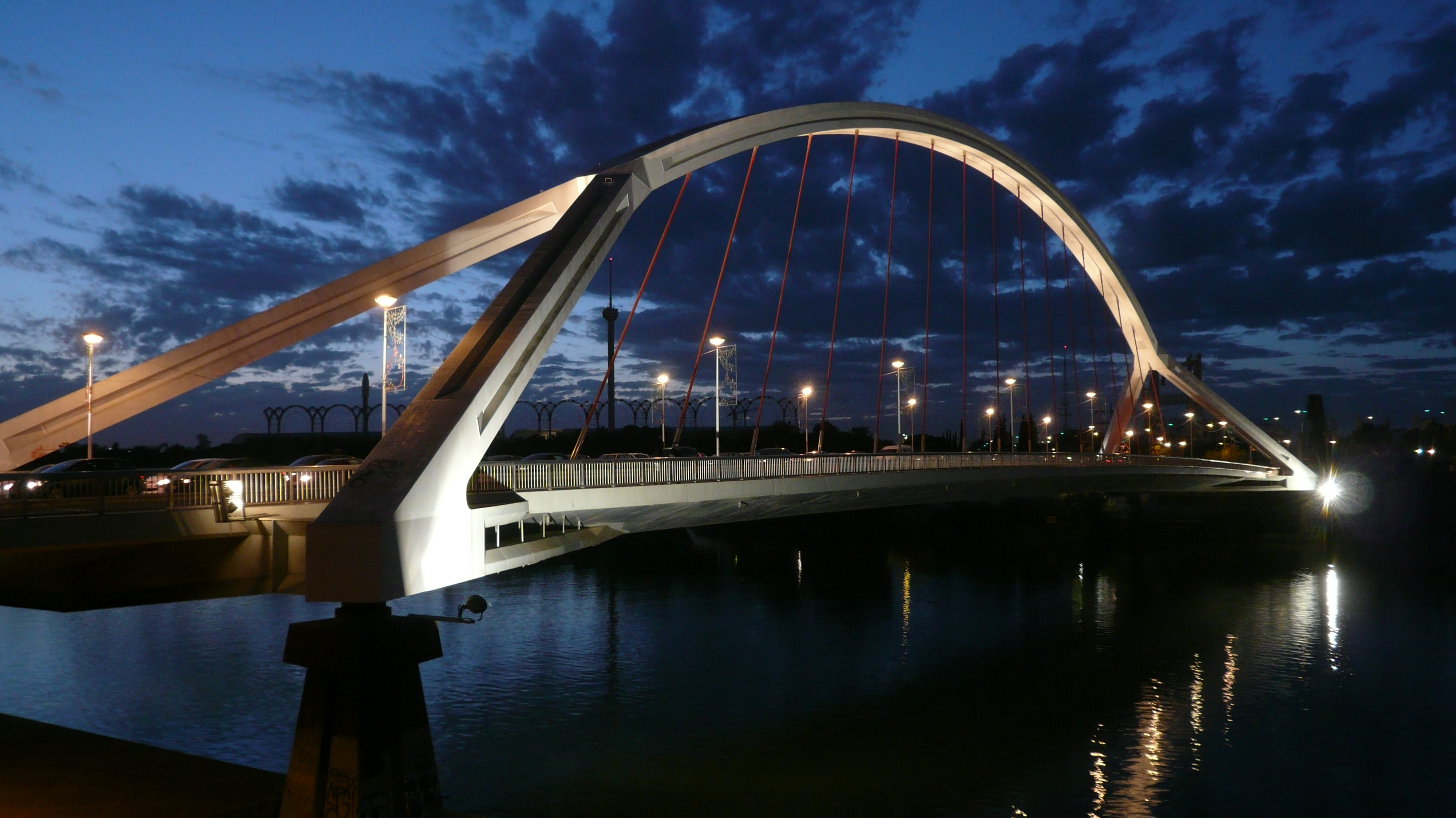 Puente de la Barqueta